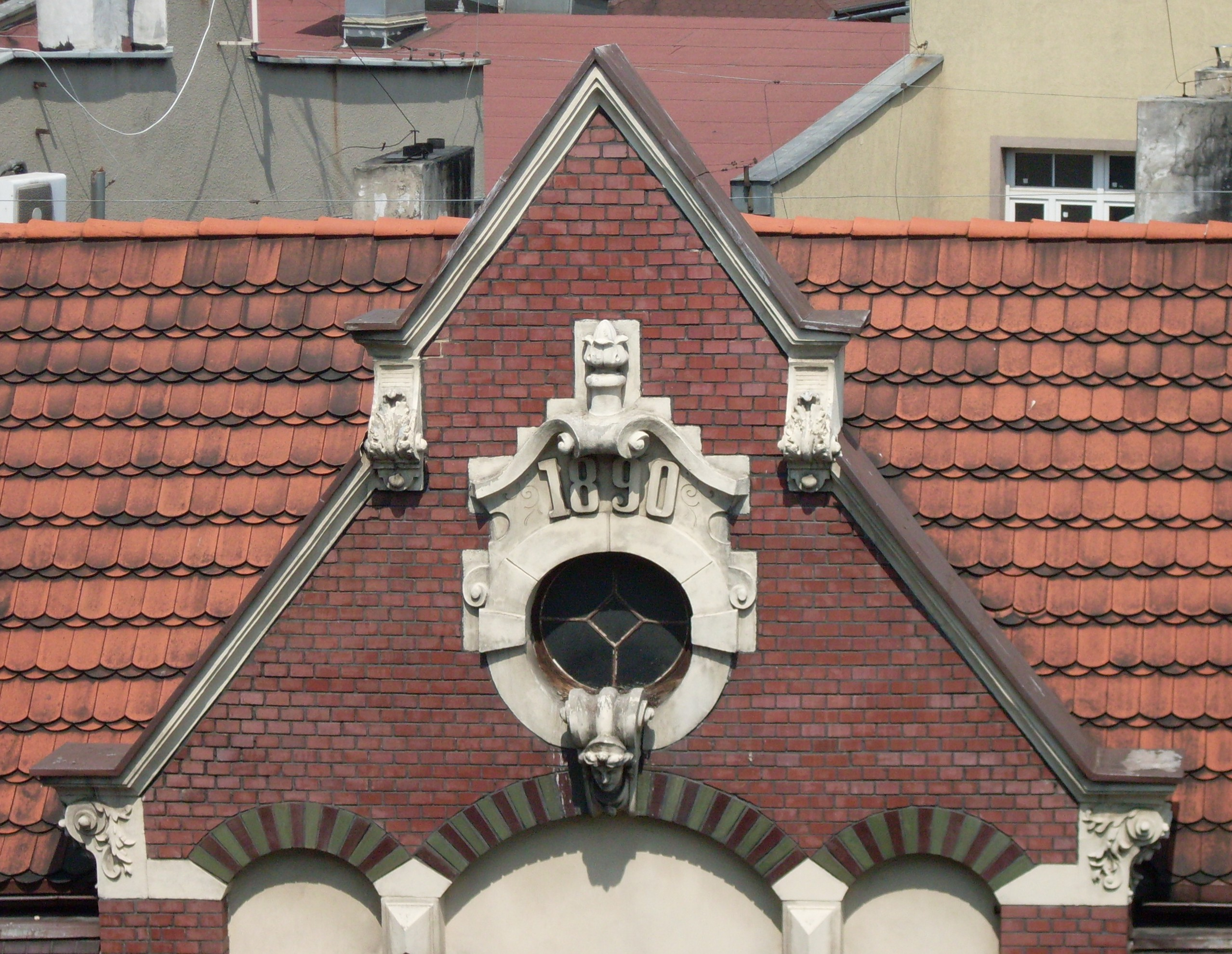 Detal na budynku na ulicy Młyńskiej 7 w Katowicach